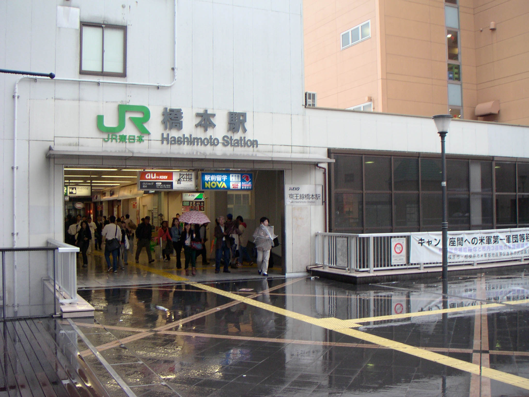 Hashimoto Station, Kanagawa